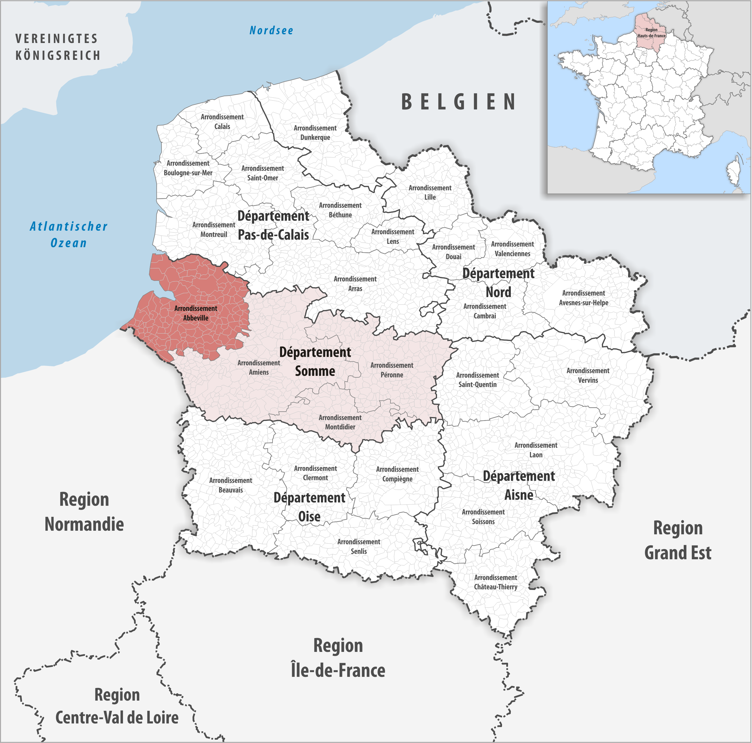 Lage des Arrondissements Abbeville